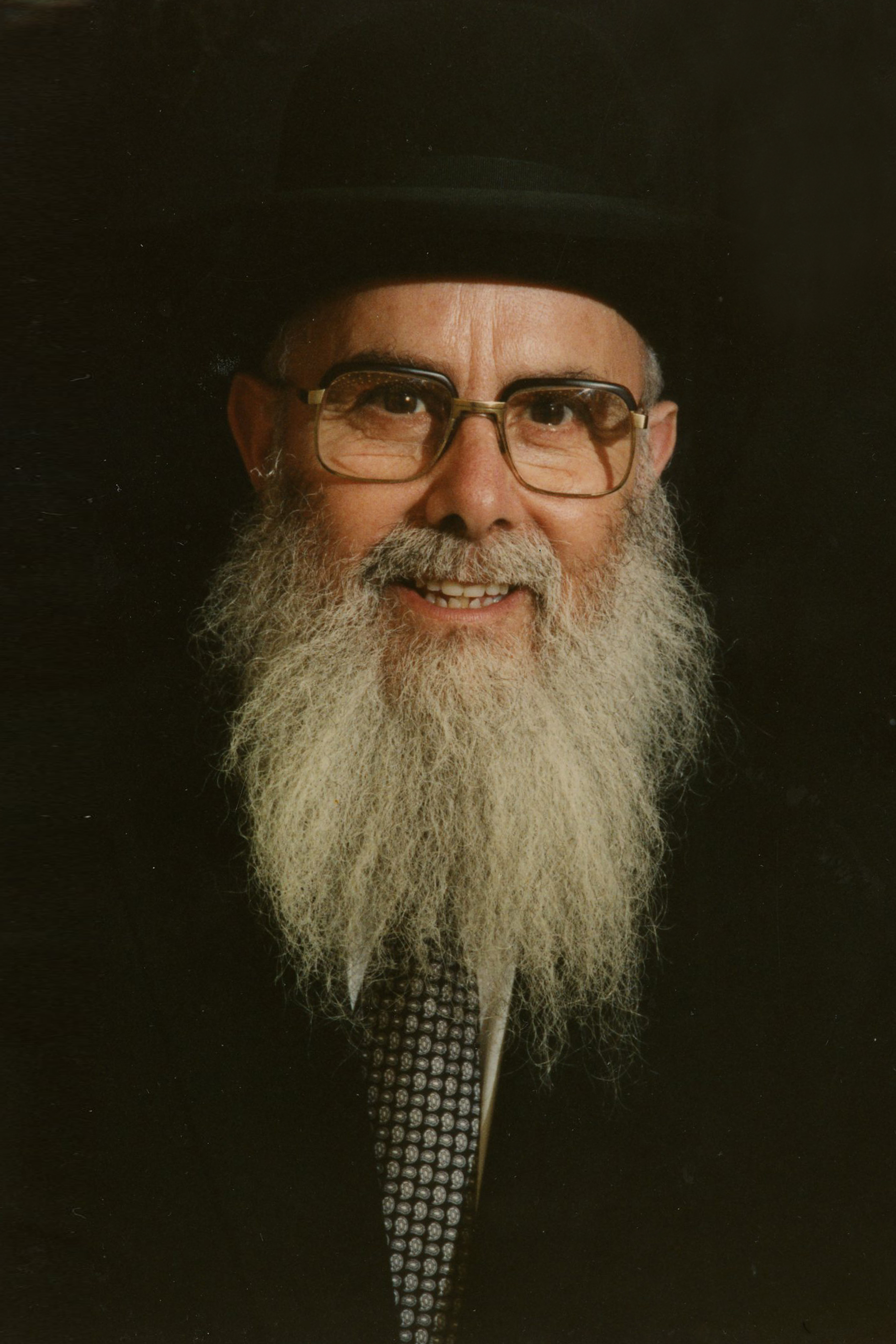 תמונתו של הרב יעקב טולידאנו